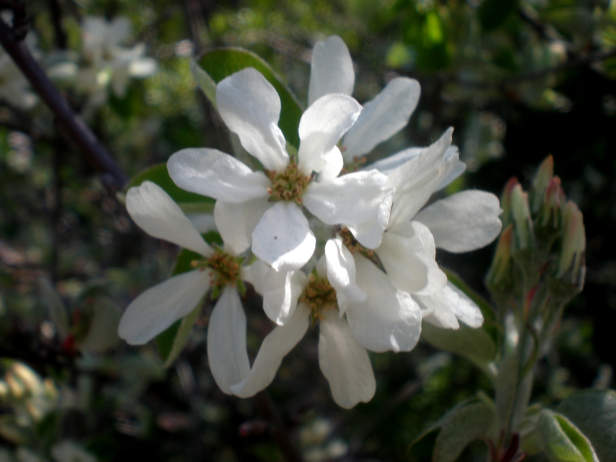 Jardín Botánico de Barcelona.